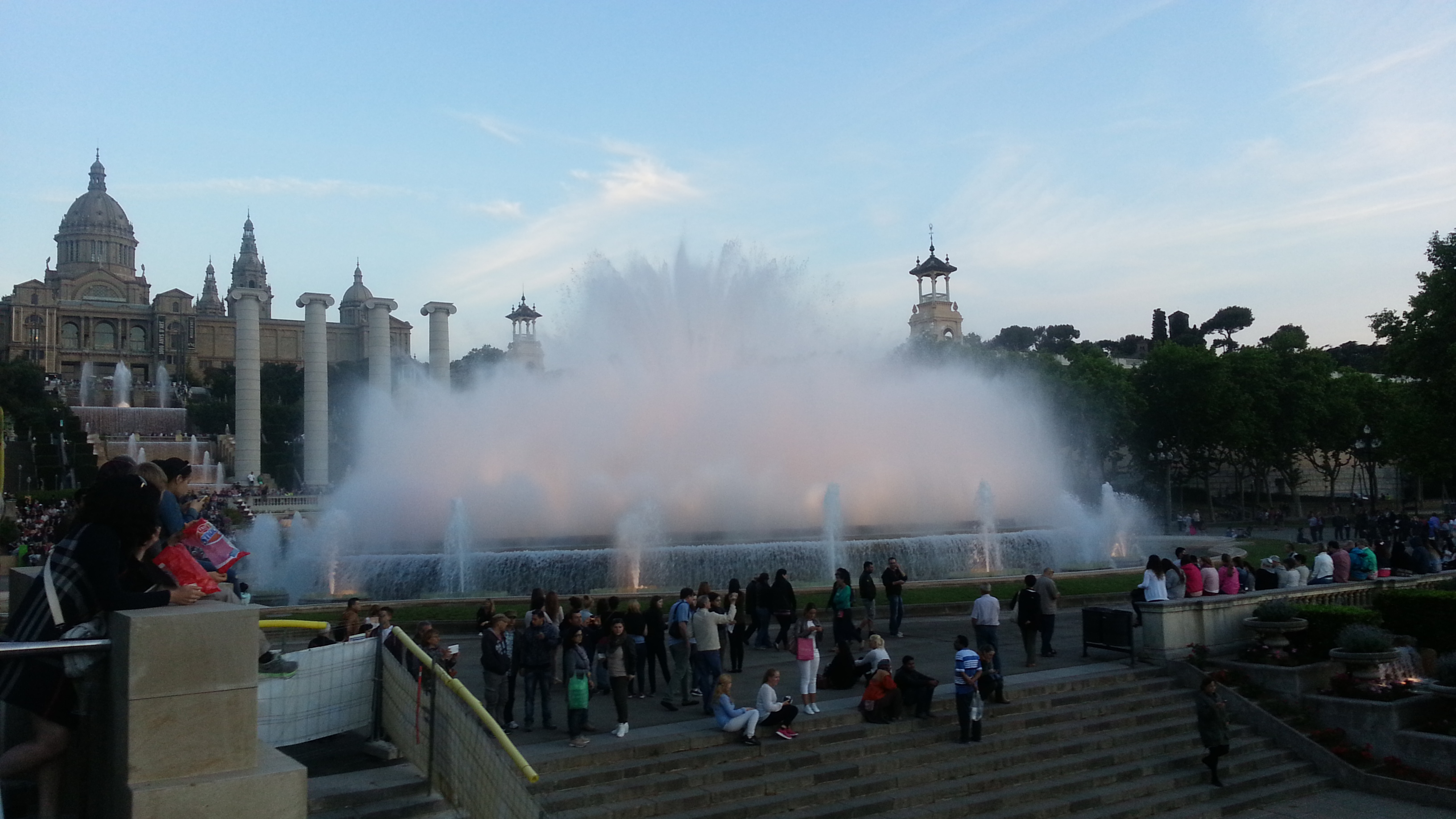 Фонтан на горе Монтжуик